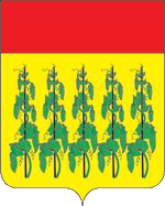 Герб Гороховецкого района Владимирской области